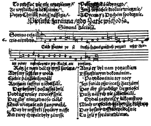 Старонка «Берасцейскага канцыянала». 1558 г. Беларуская (тарашкевіца): Старонка «Берасцейскага канцыяналу». 1558 г.